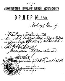 Ордер на арест Соломона Лозовского